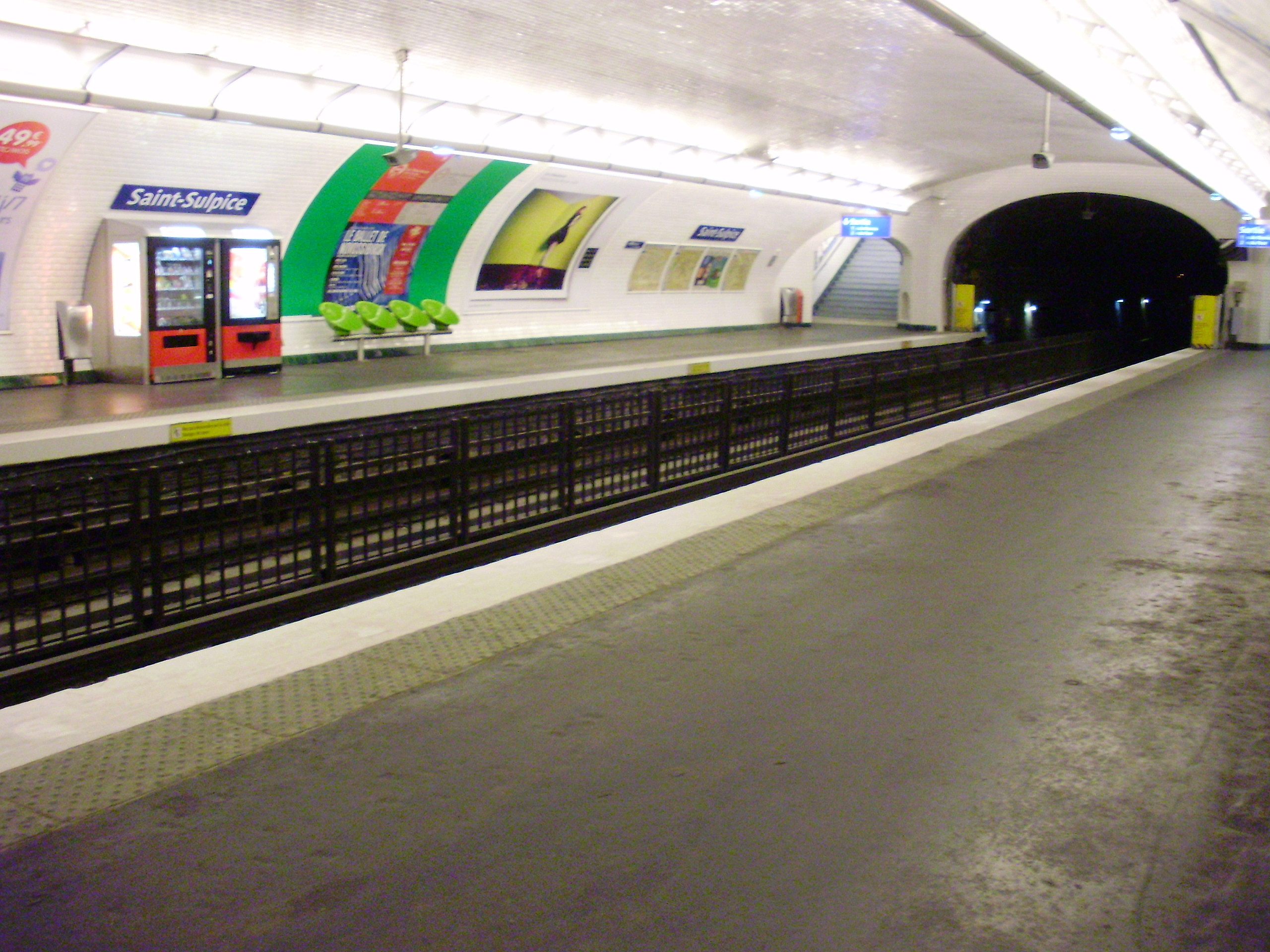 Quais de la station Saint-Sulpice du métro de Paris (vue en direction de Porte de Clignancourt)